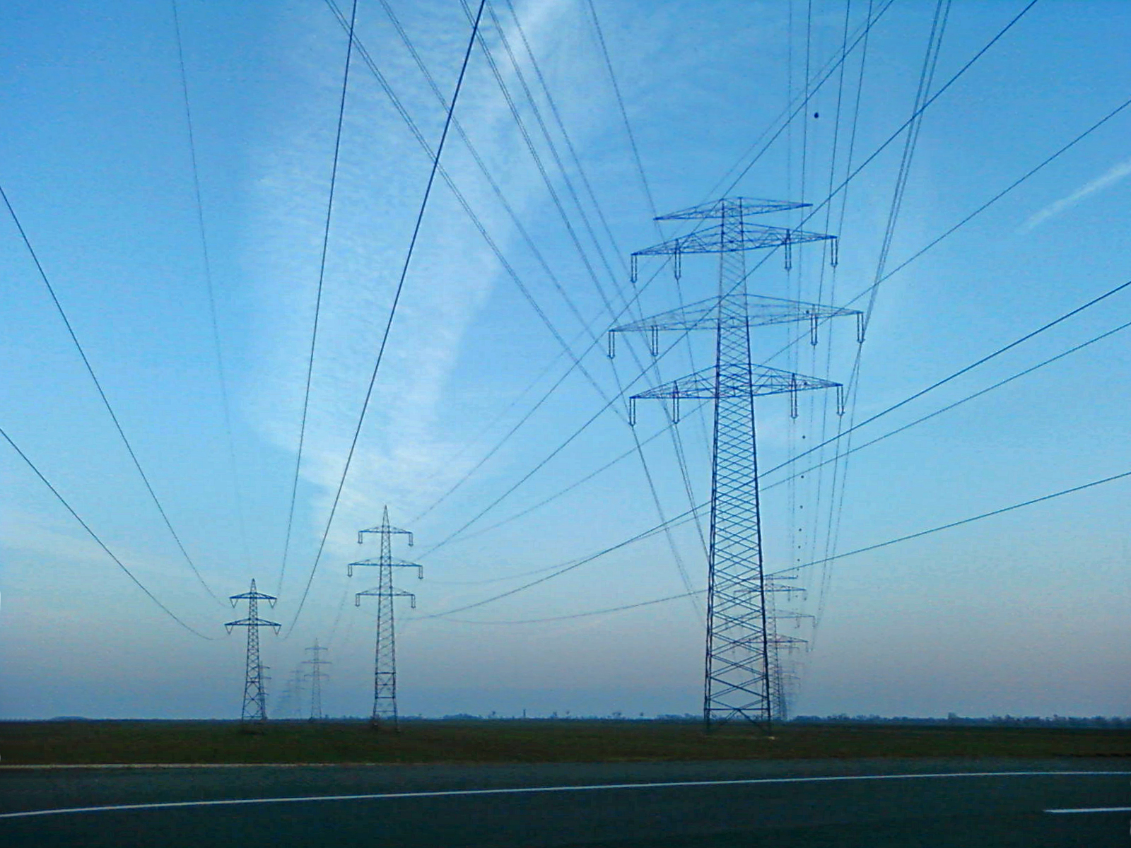 Freileitungskreuzung: Strommasten 110 kV, 220 kV und 380 kV in Himberg Richtung Südosten/Ebergassing in der Nähe von Wien Links: 2-kreisige Bahnstromleitung mit 110 kV (einphasig), daneben 2-kreisige 220-kV-Leitung via Sarasdorf nach Györ/Ungarn Rechts: 4-kreisige 380-kV-Leitung via Sarasdorf; Nach Györ gehen 2 Kreise, die anderen beiden 380-kV-Kreise verlaufen großräumig im Osten Wiens zum nördlich gelegenen Umspannwerk Bisamberg und sind Teil des innerösterreichischen 380-kV-Hochspannungsringes.